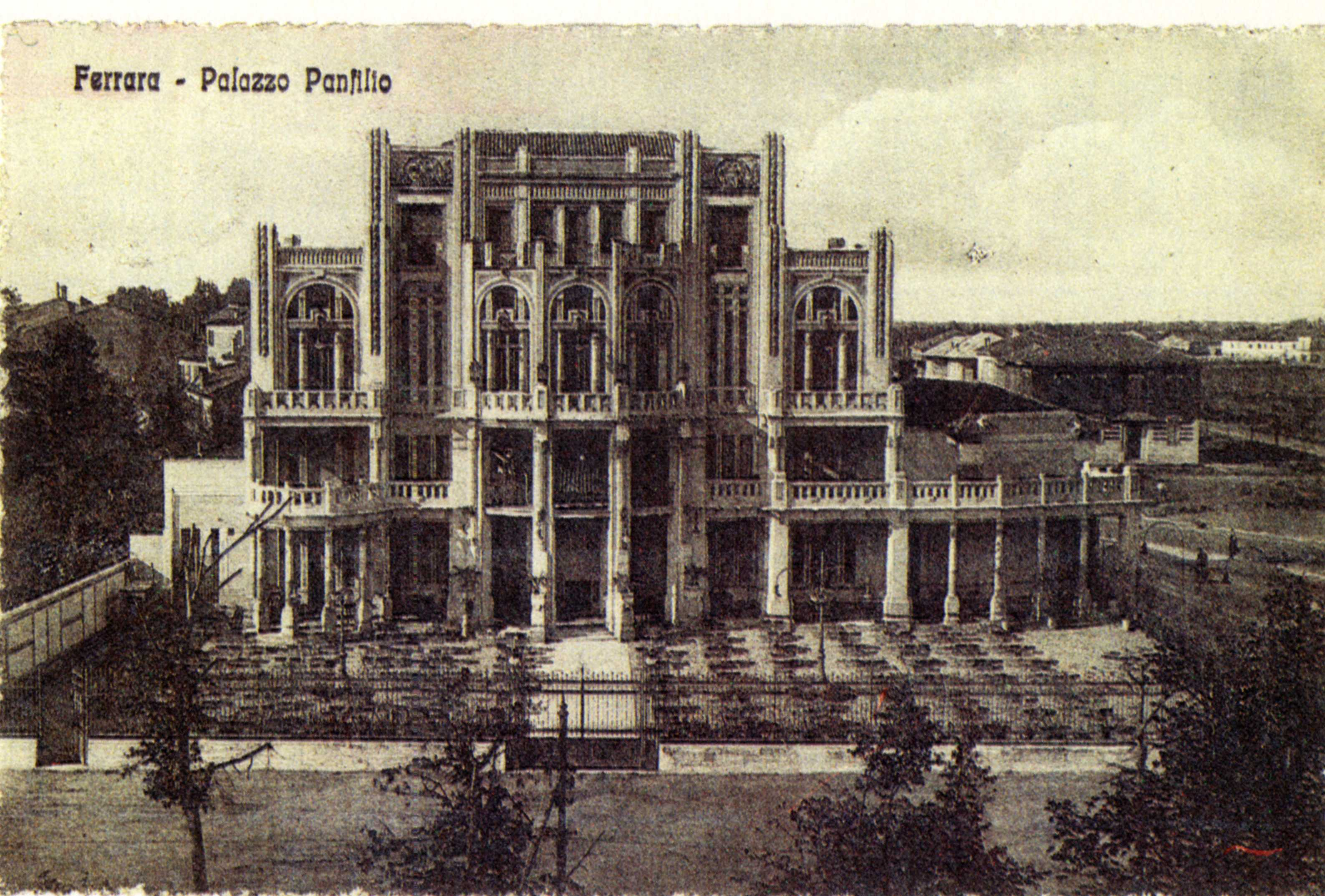 Il palazzo Panfilio, tuttora esistente, si trova a Ferrara ed è coperto dal palazzo posto all'angolo tra viale Cavour e corso Isonzo